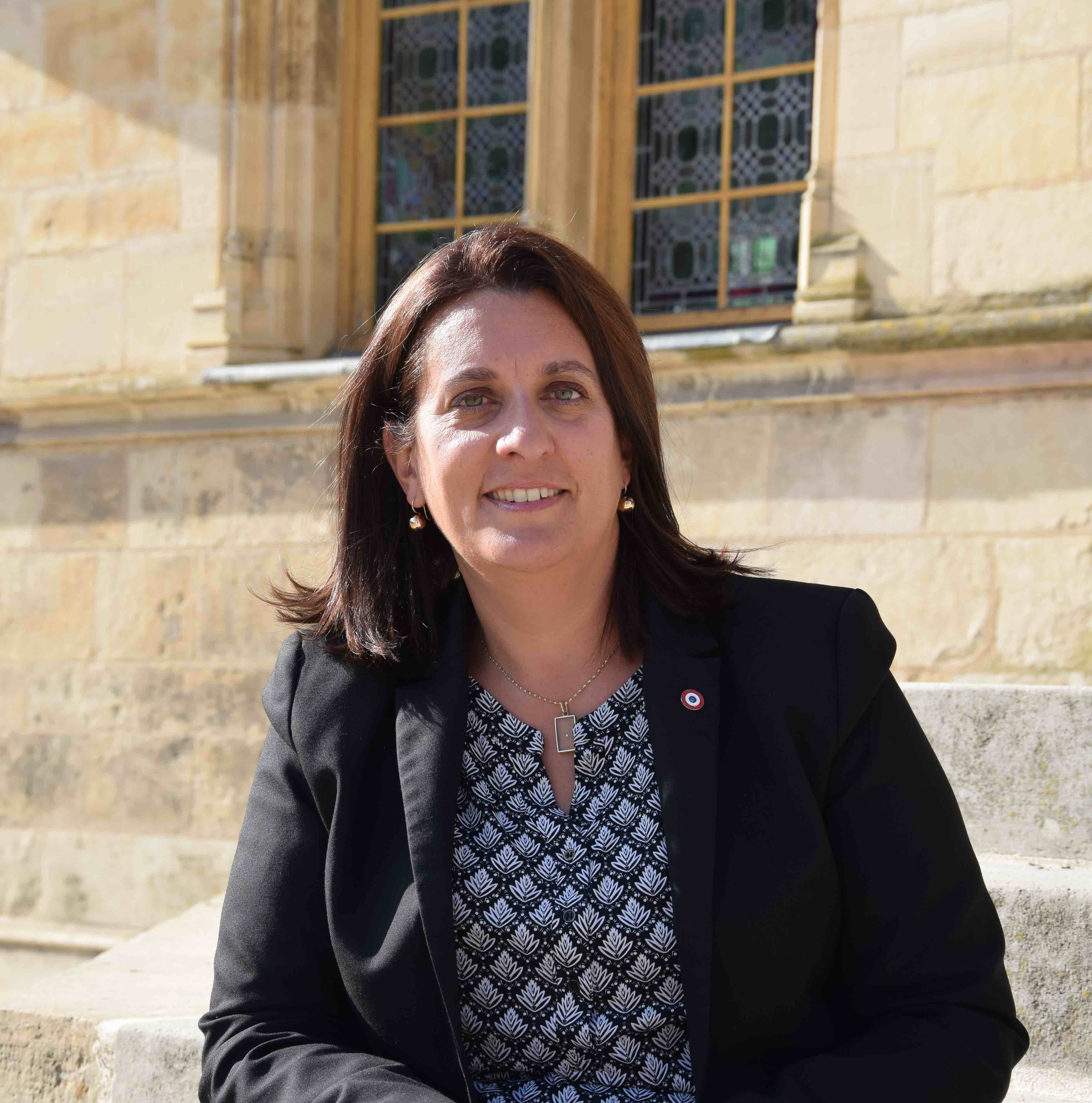 Perrine Goulet, Députée de la 1ère circonscription de la Nièvre. Photo prise en circonscription sur les marches du Palais Ducal à Nevers (58).